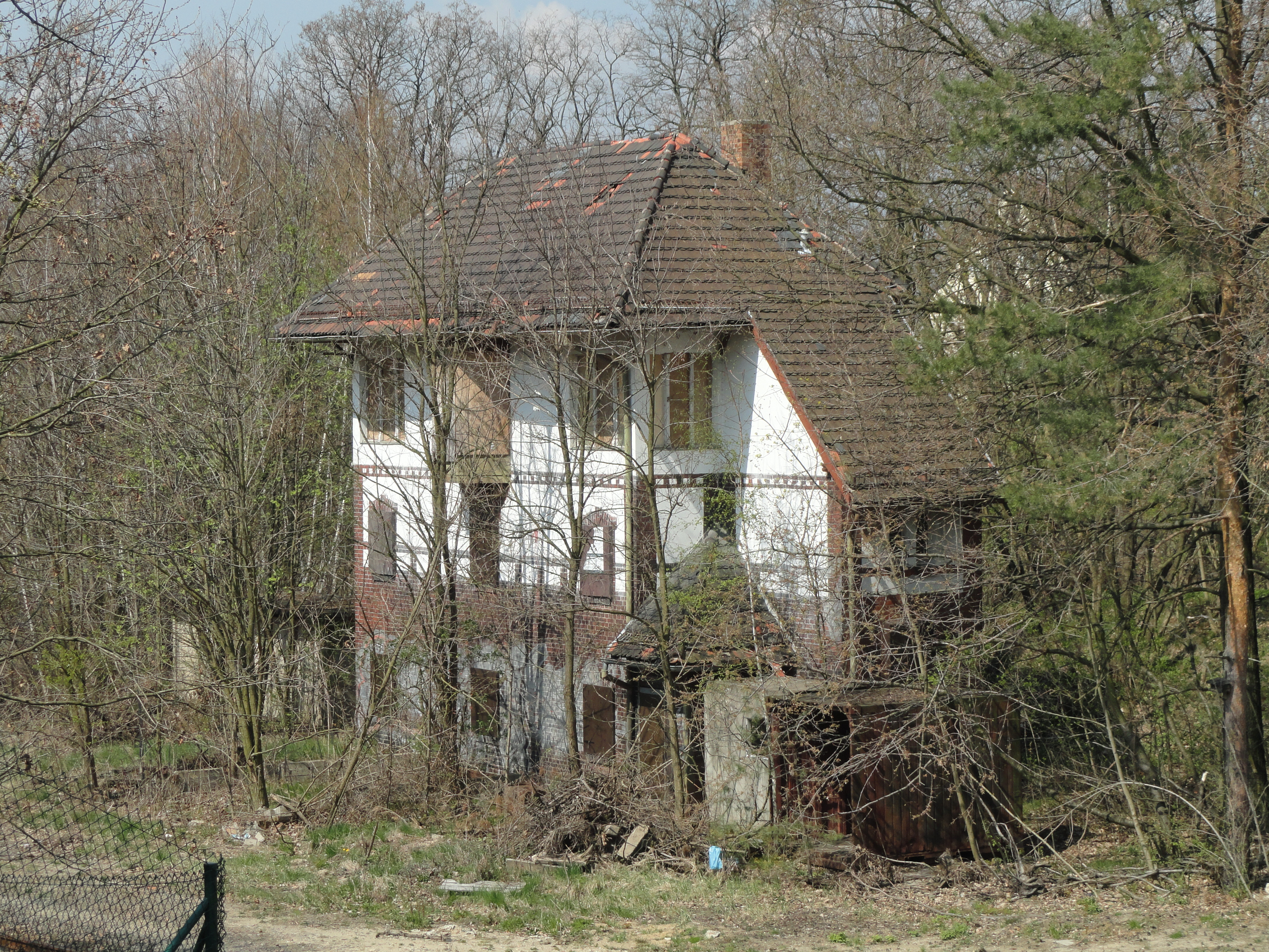 Stellwerk Sot (Schlauroth Ostturm), später B1 im ehemaligen Güterbahnhof Schlauroth